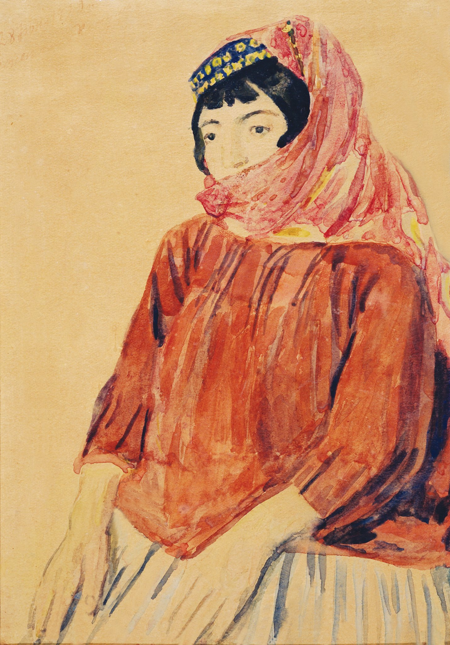 Bəhruz Kəngərli - Qaçqın qadın